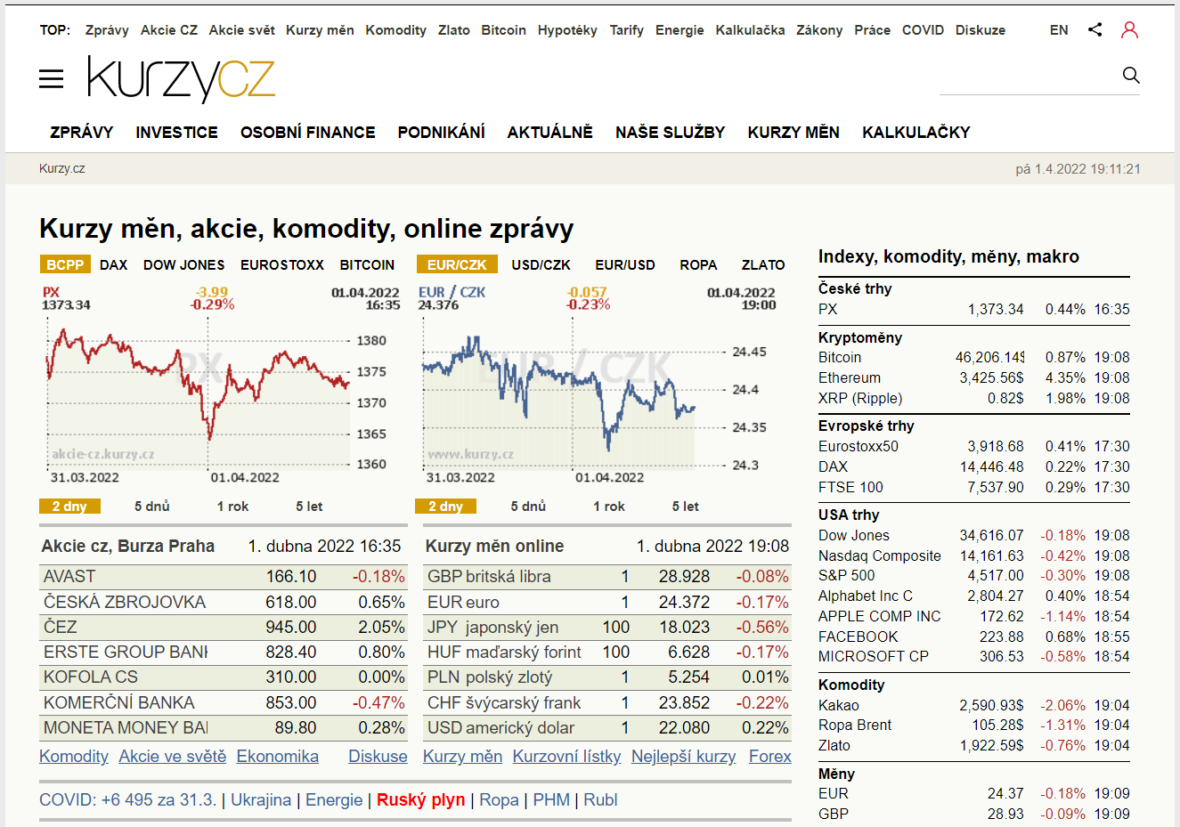 Podoba stránek kurzy.cz, 2015